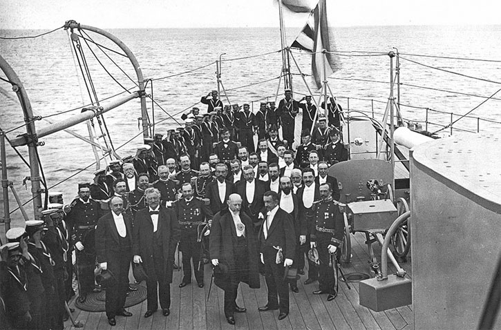 Los presidentes Julio A. Roca (Argentina) y Federico Errázuriz Echaurren (Chile) se reúnen en el Estrecho de Magallanes en 1899, encuentro llamado "El Abrazo del Estrecho"